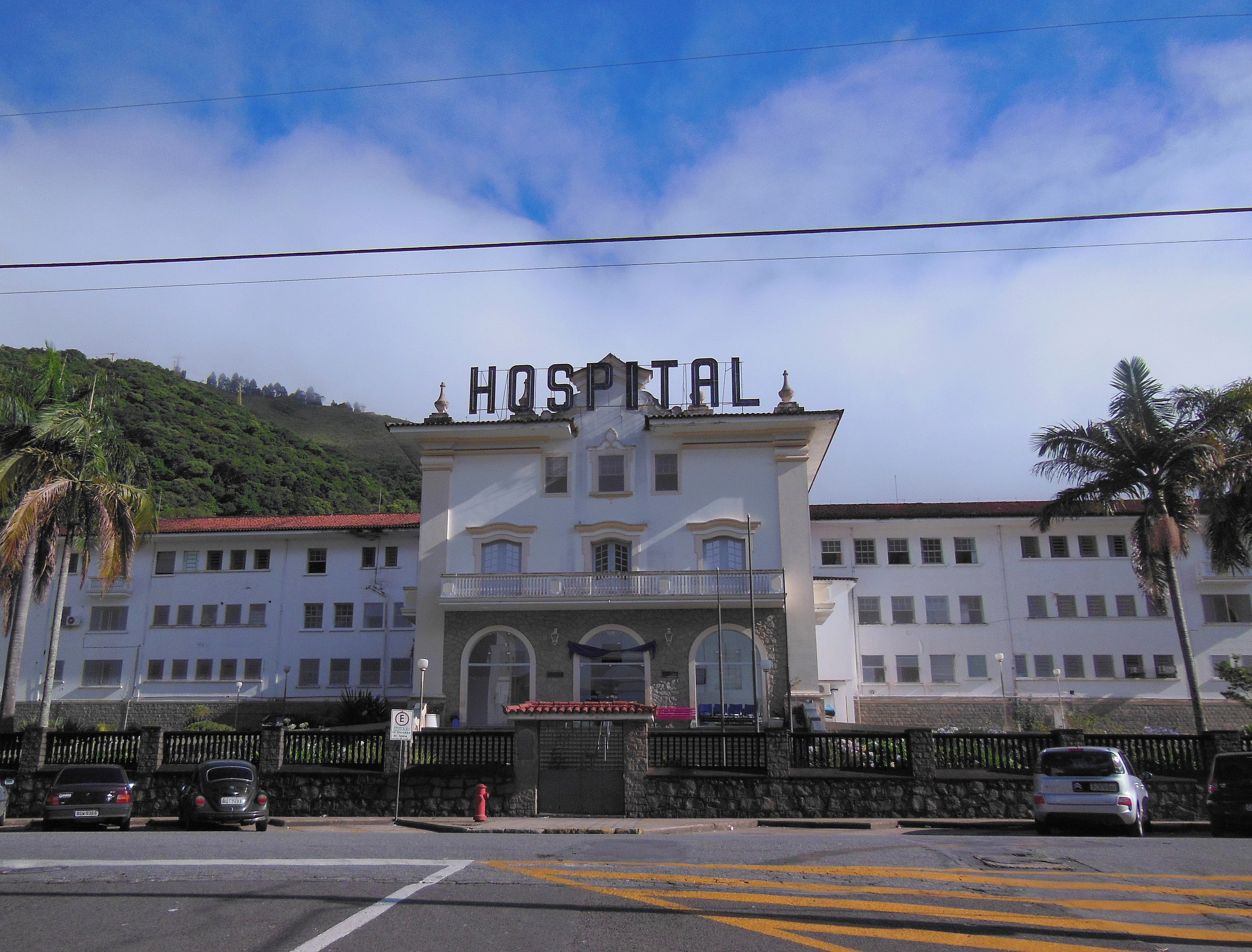 Hospital